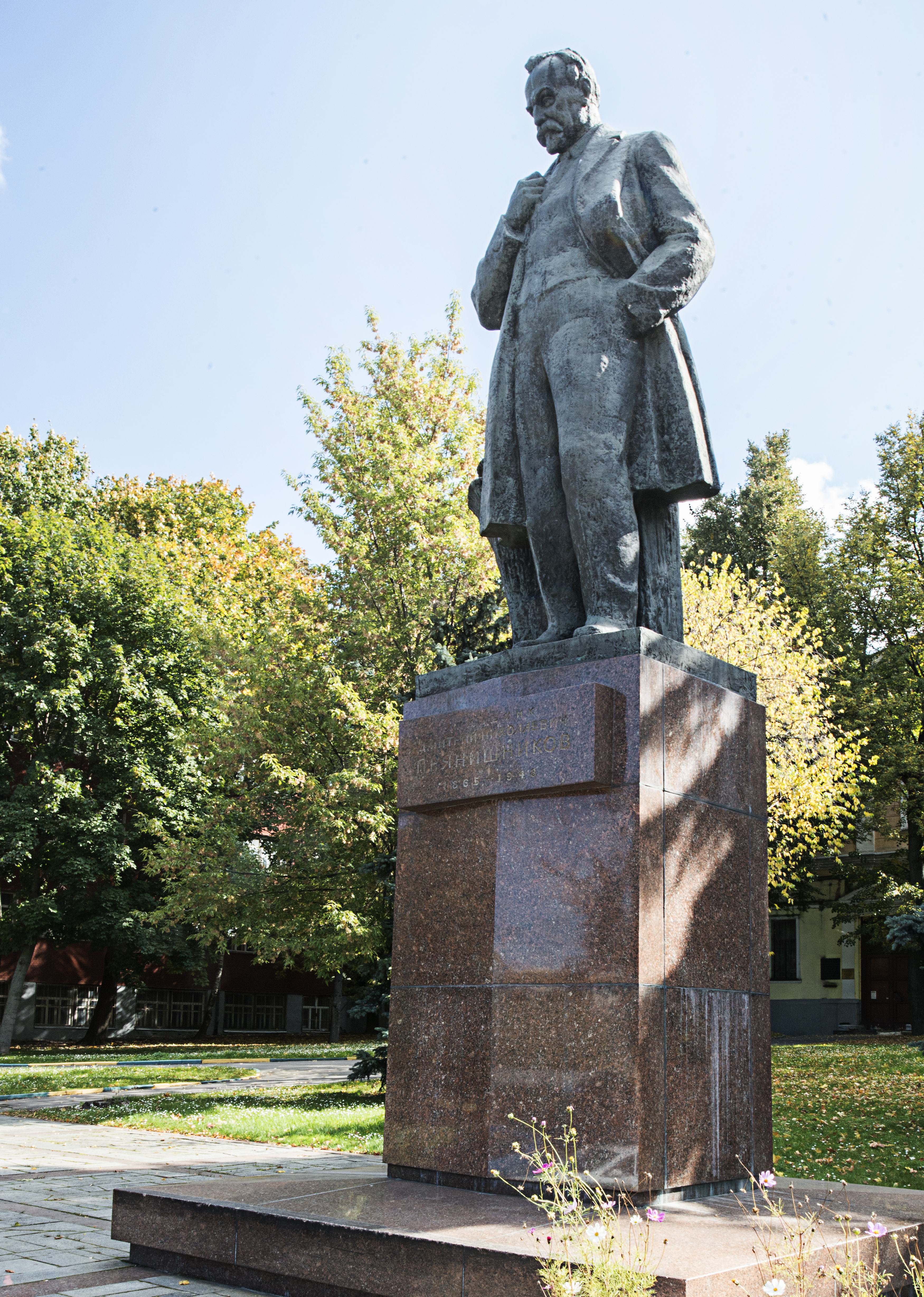 Памятник Д.Н.Прянишникову: Прянишникова ул., д.6, Тимирязевский, Северный округ, Москва